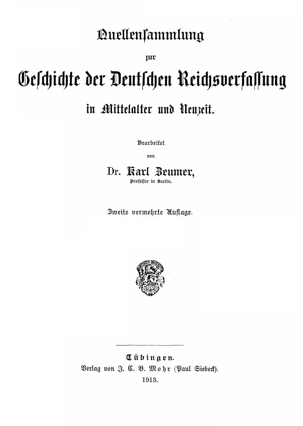 Titelblatt Quellensammlung zur Geschichte der Deutschen Reichsverfassung in Mittelalter und Neuzeit